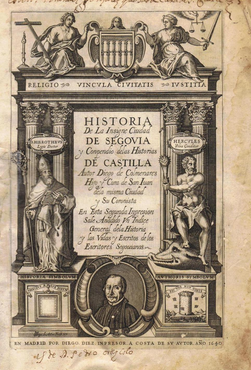 Hoja de título de la Historia de la insigne ciudad de Segouia y conpendio delas [sic] historias de Castilla autor Diego de Colmenares... en Madrid por Diego Díaz de la Carrera, 1640. Grabado calcográfico firmado por Diego de Astor con el retrato del autor en la base.